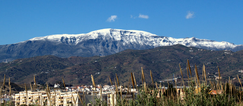 Nevada